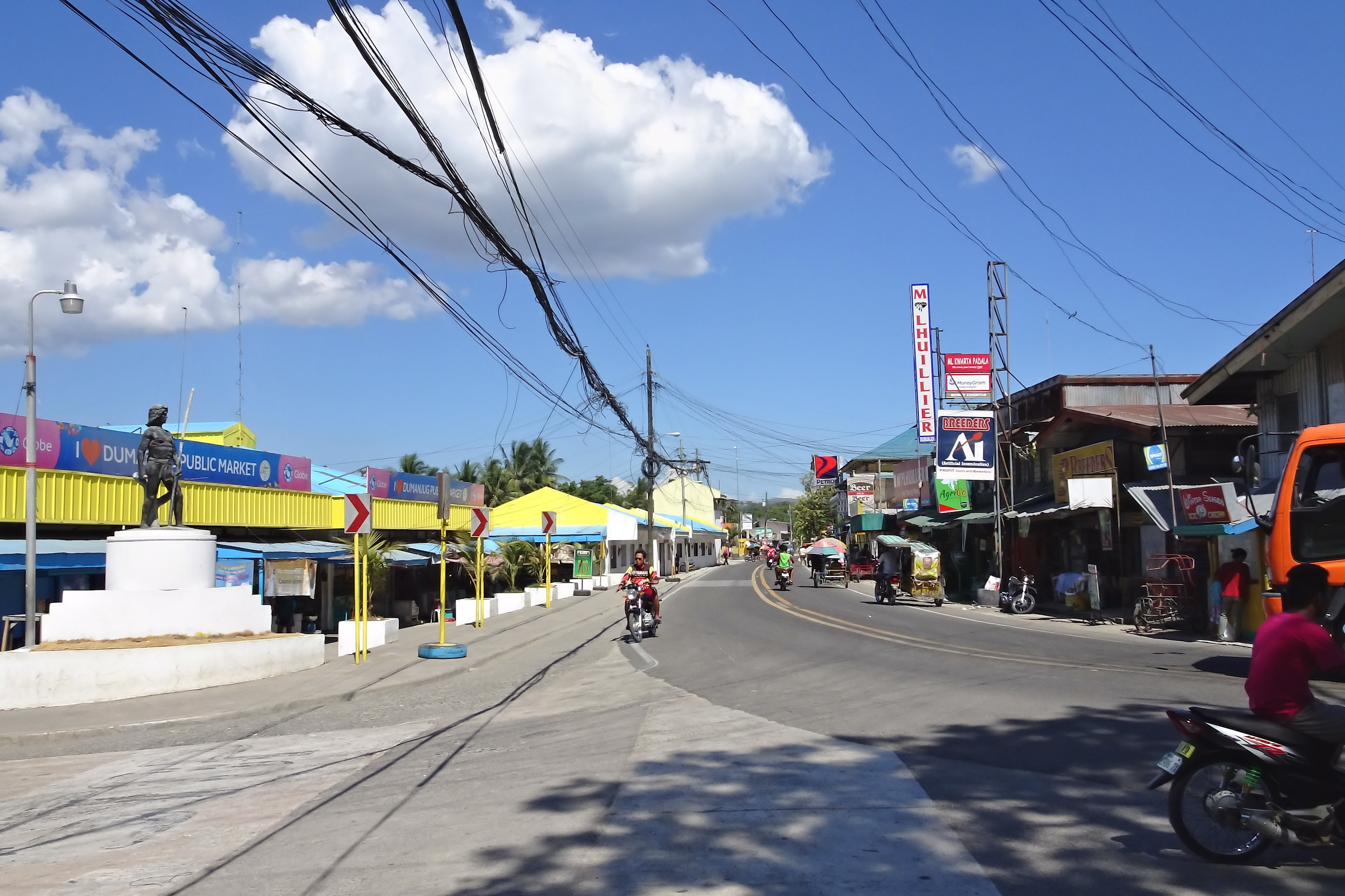 Dumanjug, Cebu, Philippines